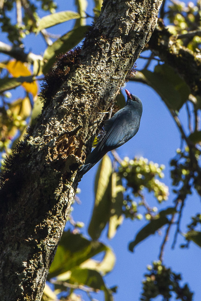 Nuthatch Vanga - Andasibè - Madagascar_S4E7519